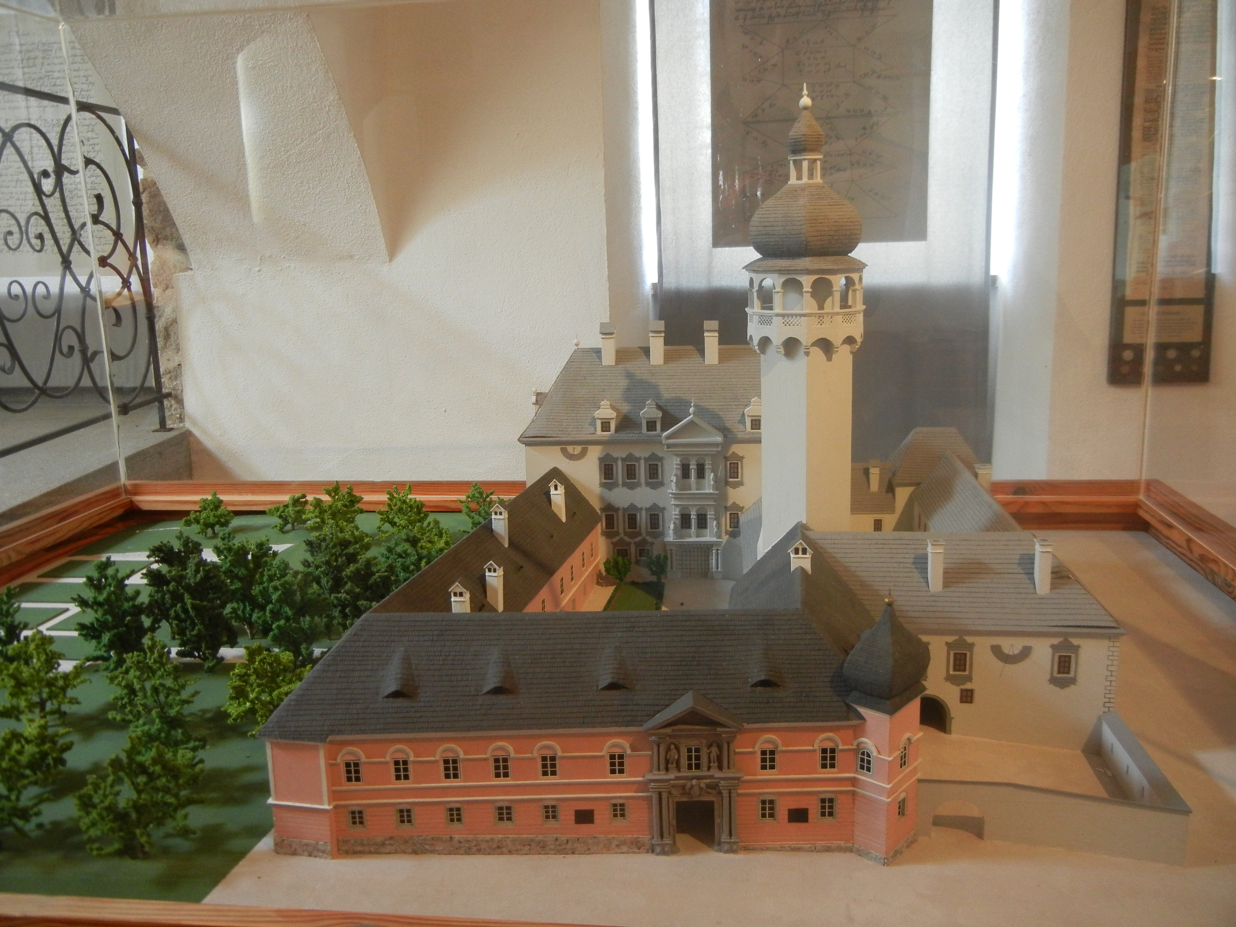 Modell von Schloss Peuerbach - vor 1777.